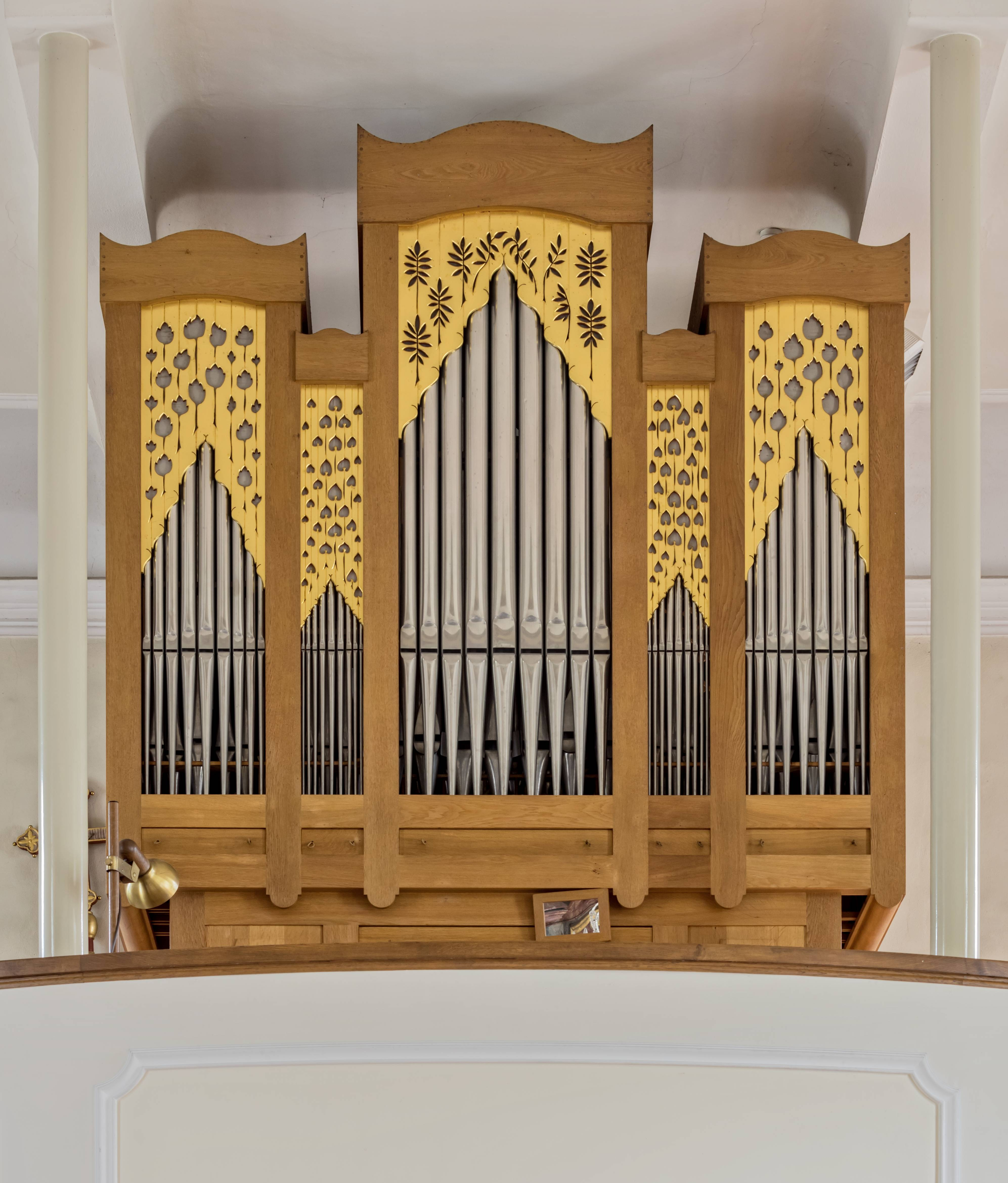 Bilder aus Freiburg von der Kirche St.Peter und Paul in Freiburg Kappel Die Orgel